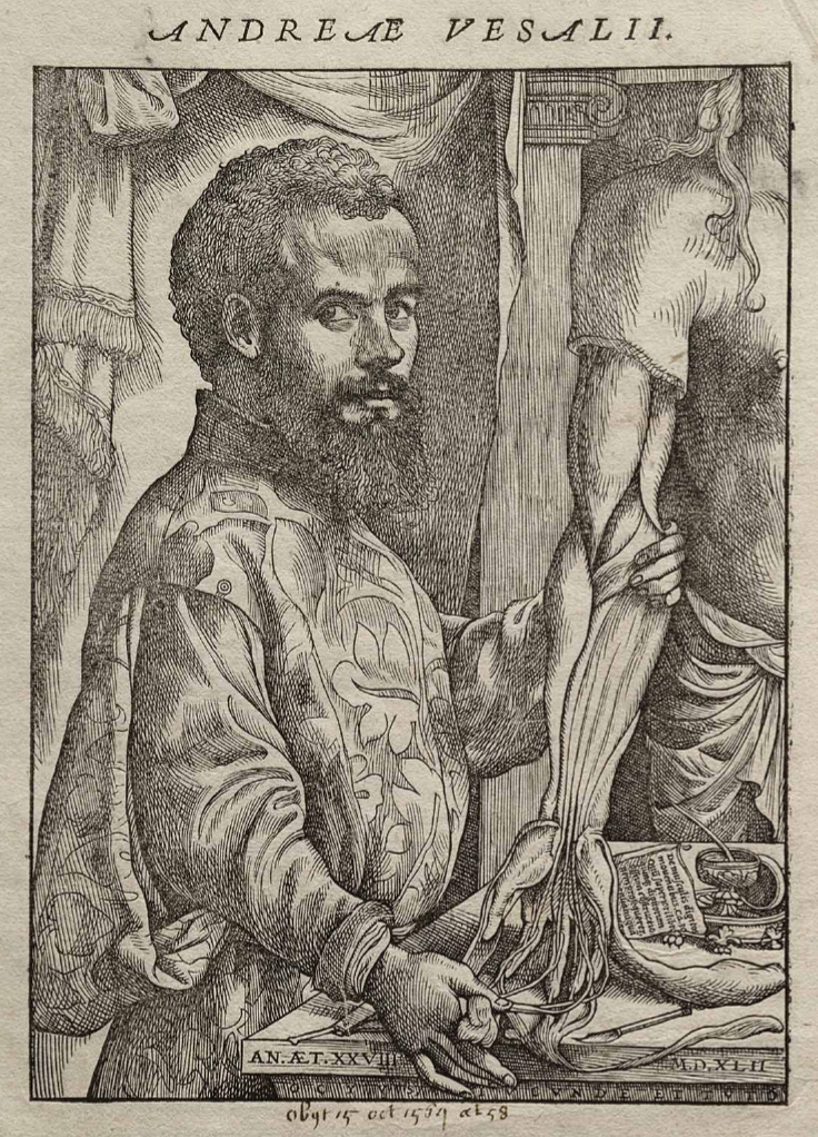 Portrait of Vesalius from his De humani corporis fabrica.label QS:Len,"Portrait of Vesalius from his De humani corporis fabrica."label QS:Les,"Andrés Vesalio (retrato procedente de su obra Fabrica)."